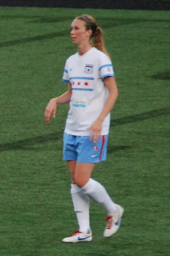 Michelle Wenino (2014)